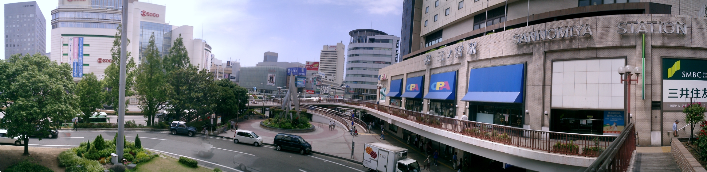 JR-Sannomiya-Station,Hyogo,Japan